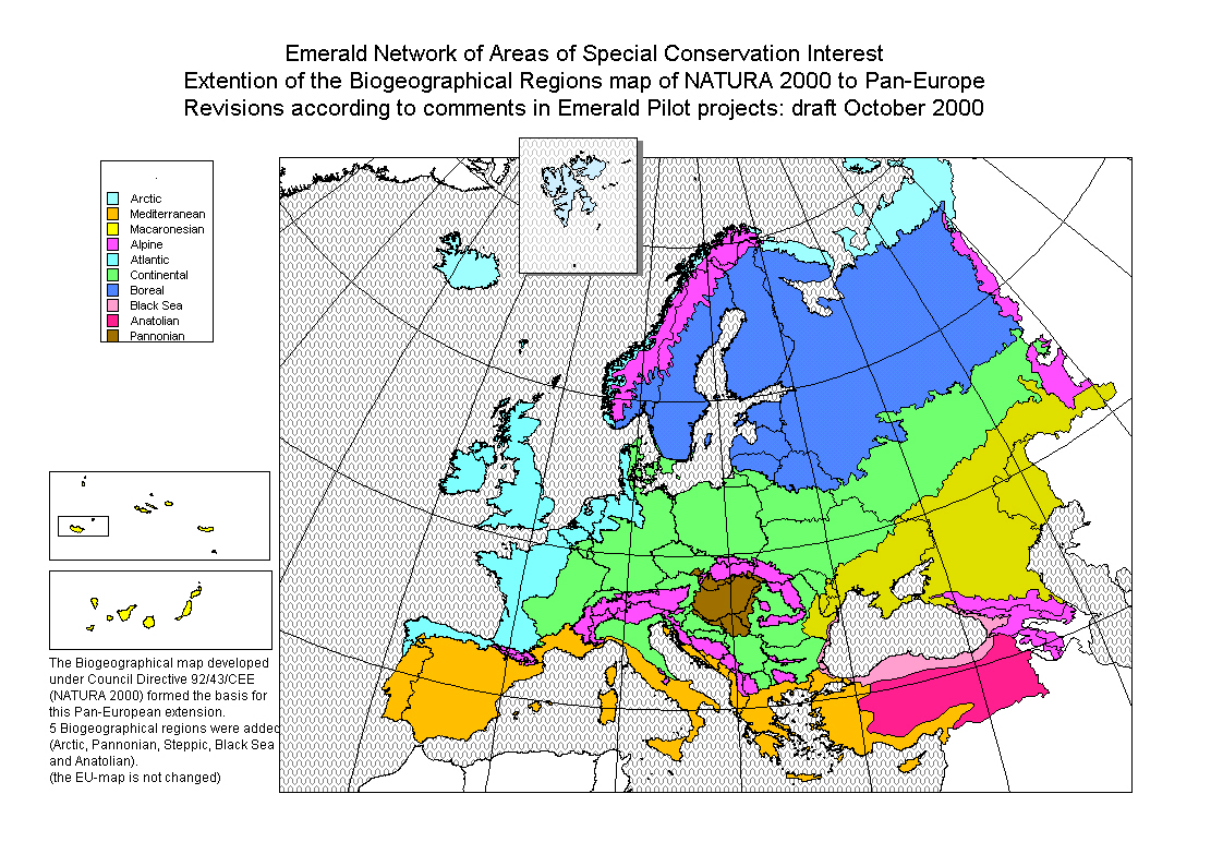 Схема біогеографічного поділу Європи станом на 2000 рік